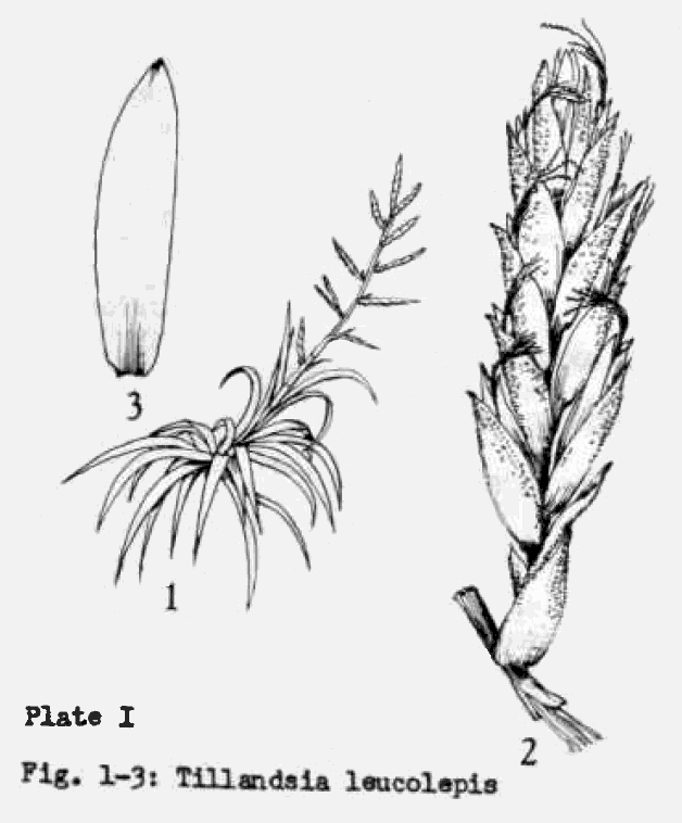 Tillandsia leucolepis L.B.Sm., illustration du protologue réorganisée